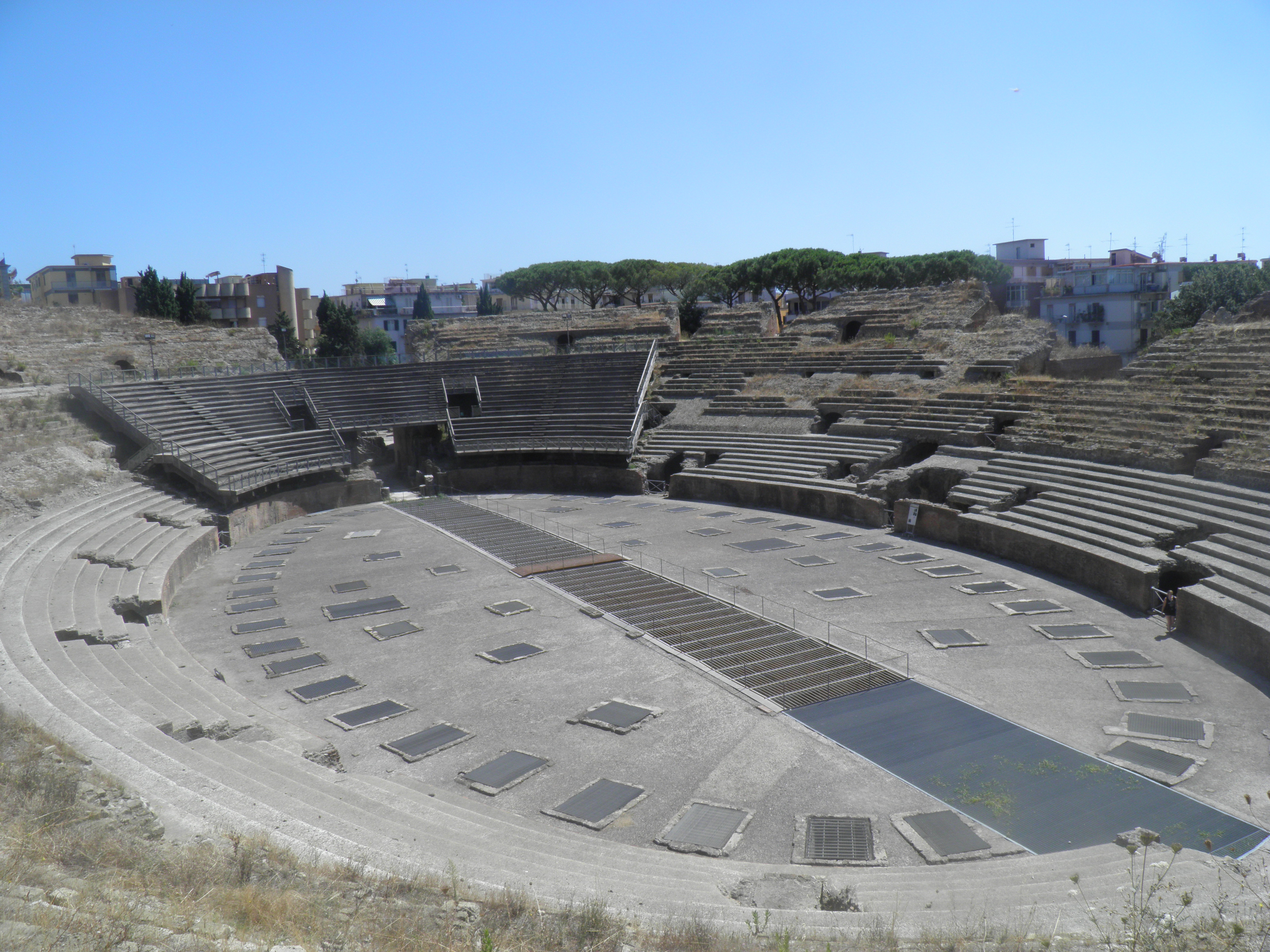 Amfiteatr Flawiuszy w Pozzuoli